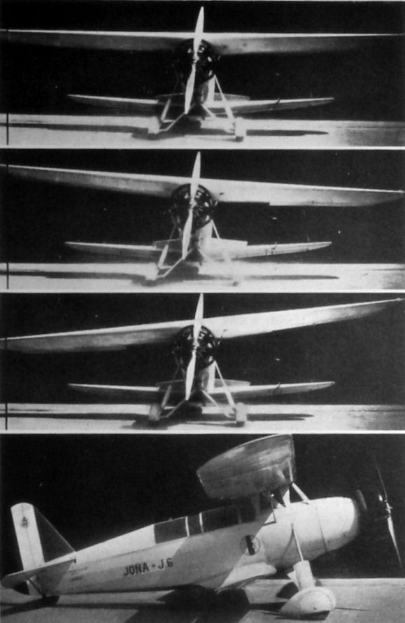 Jona J.6 movimento della ali